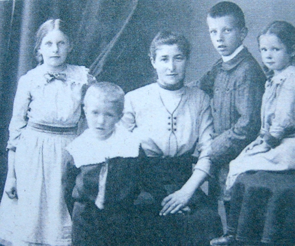 Barbara Spinatsch-Uffer mit ihren Kindern Franziska, Peter, Margaritta und Franz aus der ersten Ehe ihres Mannes